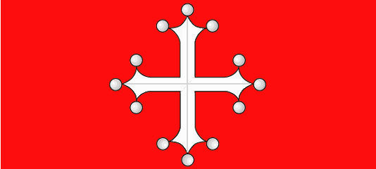 Bandiera di Pisa